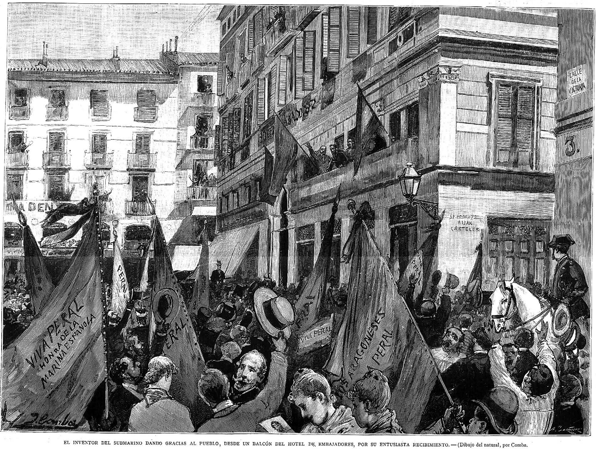 Isaac Peral en Madrid - El inventor del submarino dando gracias al pueblo, desde un balcón del hotel de Embajadores, por su entusiasta recibimiento, dibujo del natural de Juan Comba y García, en la revista La Ilustración Española y Americana.